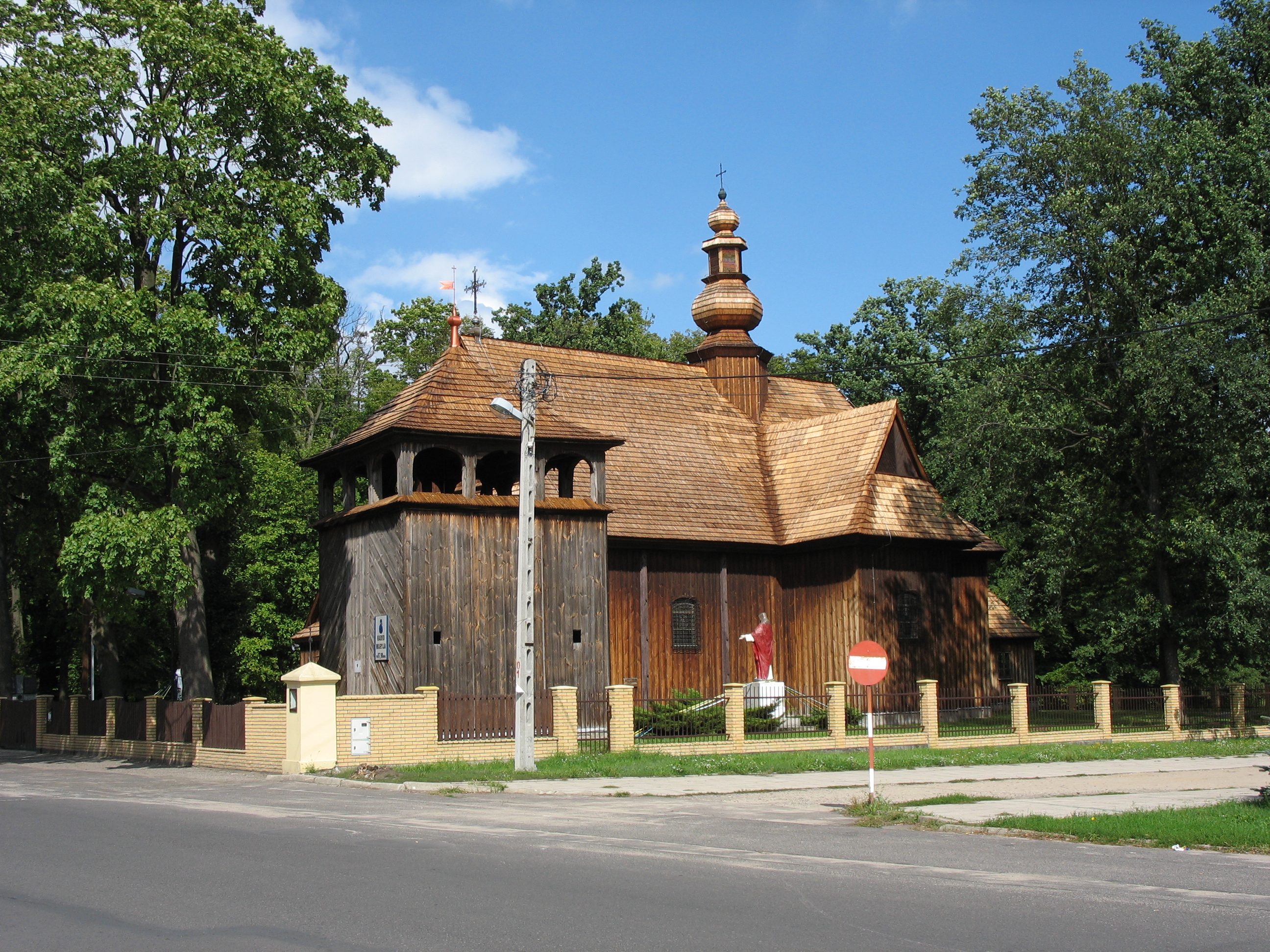 Dobroń - kościół św. Wojciecha